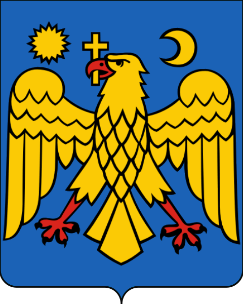 Coat of arms of Muntenia since the coats of arms of Wallachia here File:Coat of arms of Wallachia under Matei Basarab (Marcus Boschinius version).svg, File:Naval Ensign of Wallachia.svg, [1], [2], [3] & [4]